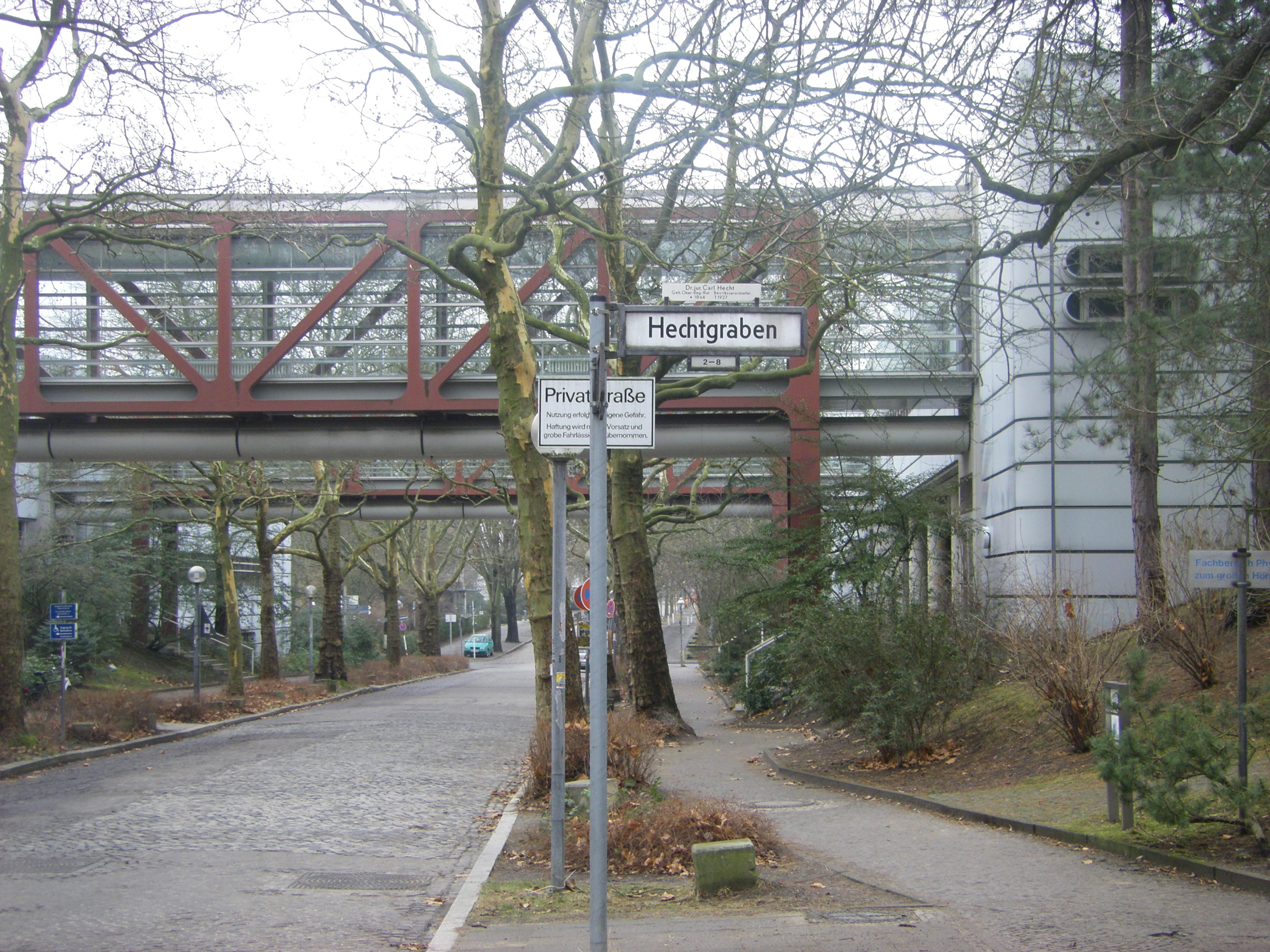 Berlin-Dahlem Arnimallee 14 Physik-Gebäude